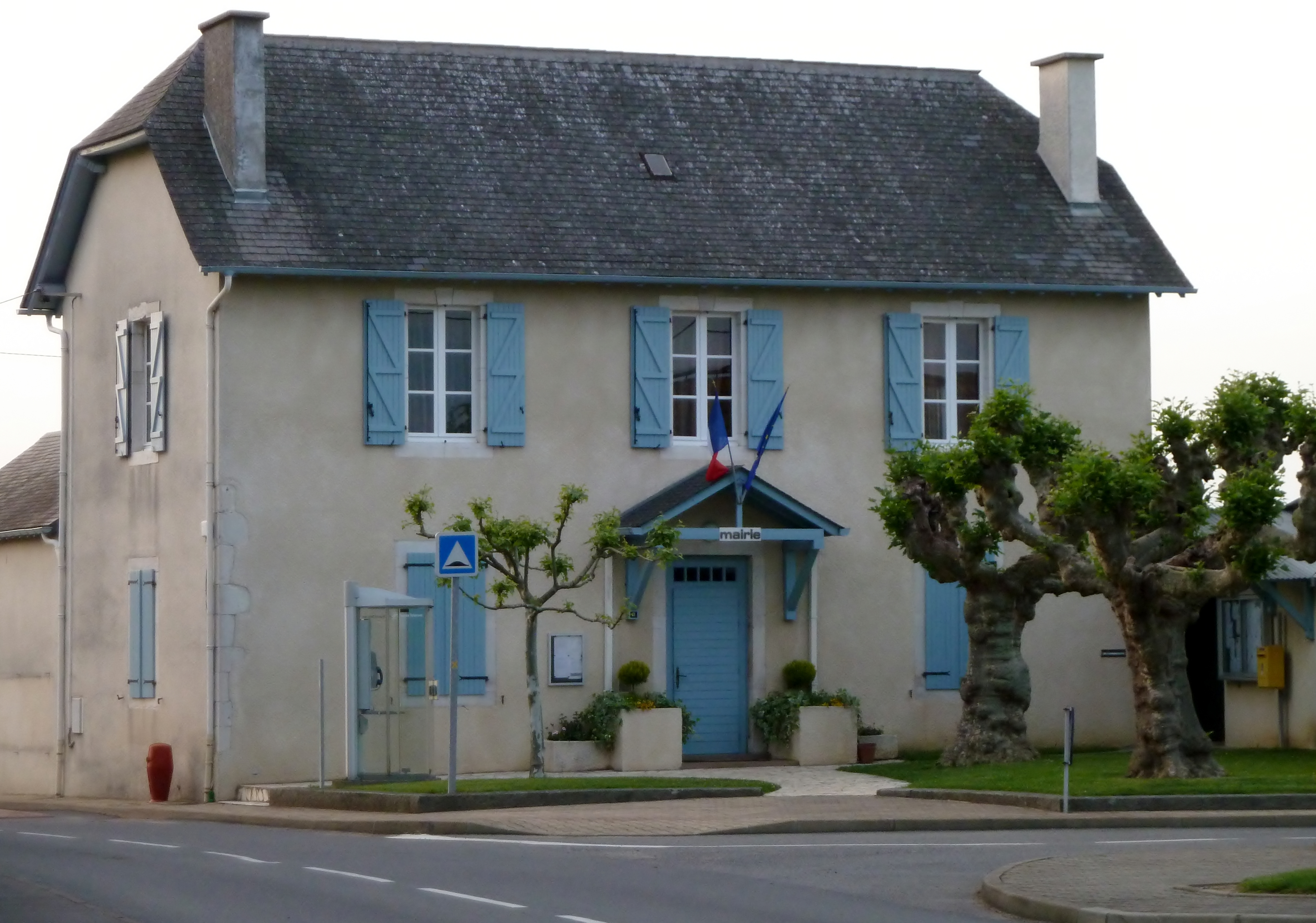 Andoins, France Image prise avec le zoom au maximum, la qualité est donc faible